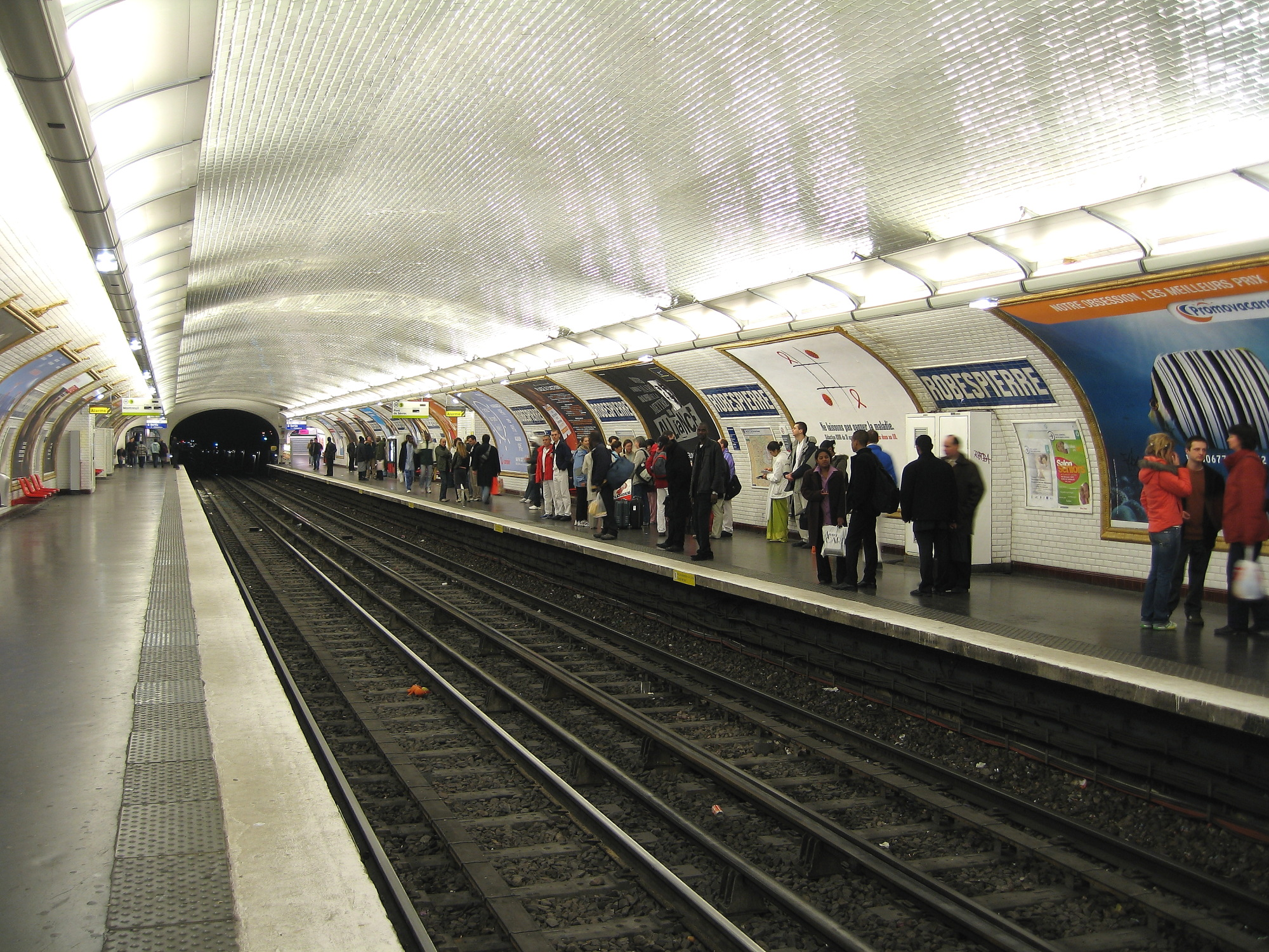 Quais de la station du métro parisien Robespierre vue en direction de Pont de Sèvres.